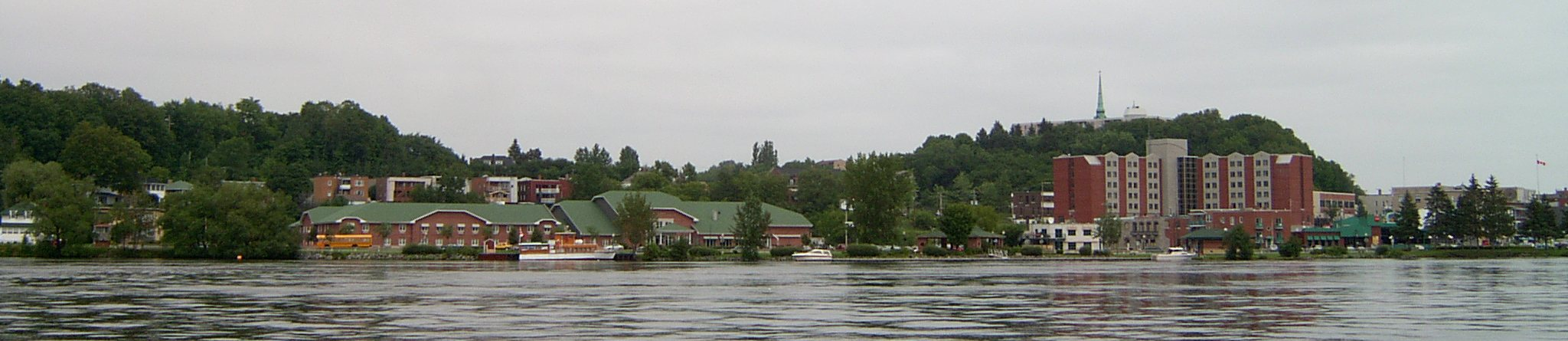 Partie ouest du boulevard Saint-Maurice, sur la rive du Saint-Maurice, à Shawinigan (QC), près du centre-ville. Sur la colline, à l'arrière-plan, le clocher de l'église Saint-Pierre.